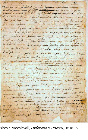 Machiavelli: autografo dei "Discorsi sopra la prima Deca di Tito Livio"